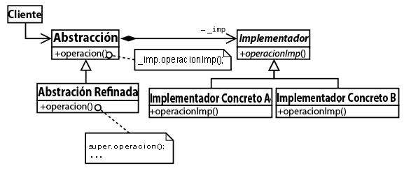 Estructura del Patrón Bridge ( en gallego )